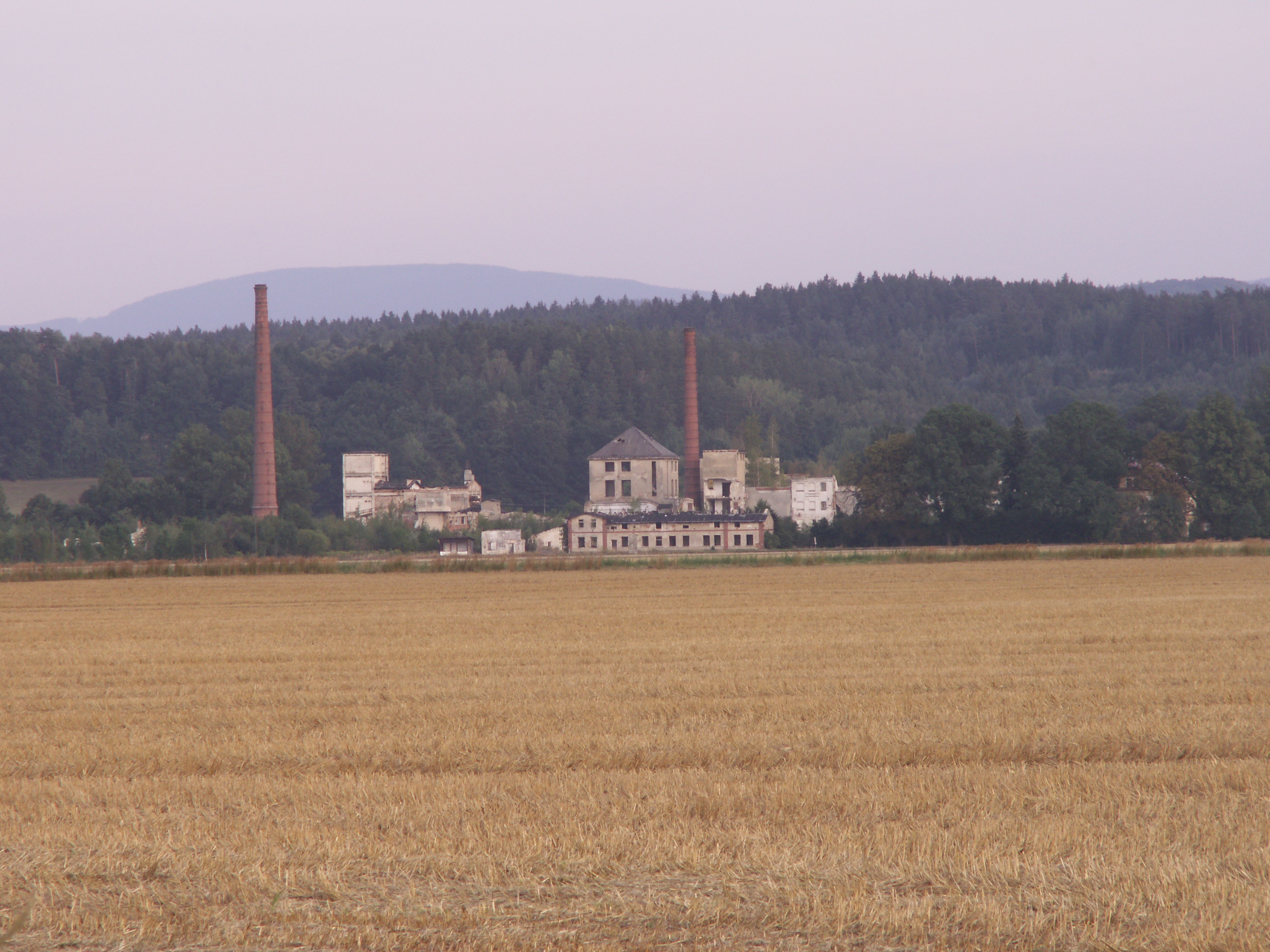 Fojtova Kraš, část obce Velká Kraš, okres Jeseník, bývalá továrna Vidnavská kaolinka